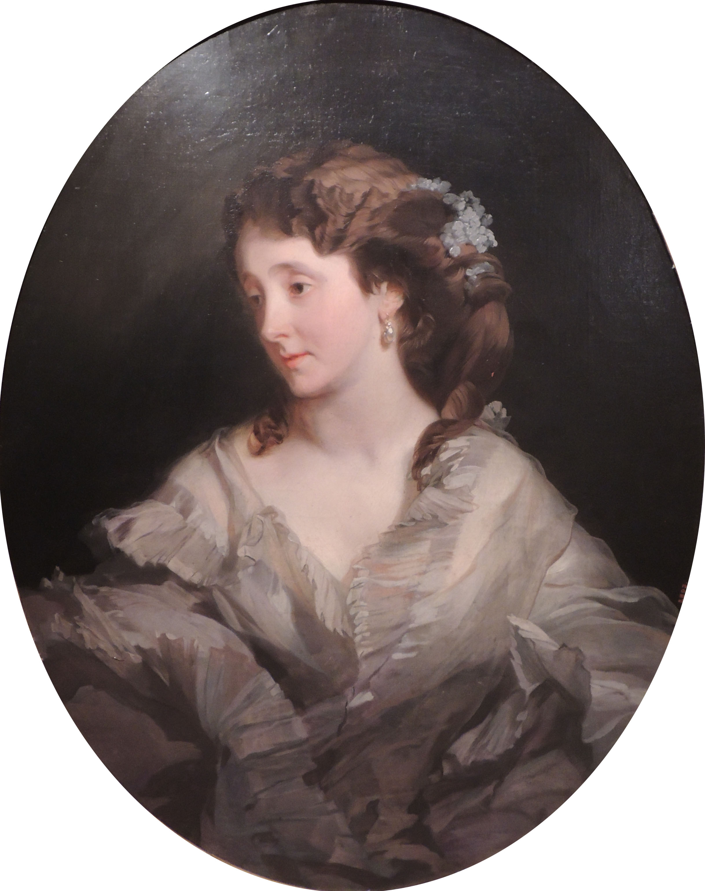 Иван Макаров. "Портрет Челищевой". 1850-60-е (?). Холст, масло. ГТГ. Ранее публиковался как изображение Александры Михайловны Челищевой, ур. Веригиной (1816-1913) и датировался 1865 годом. В каталоге ГТГ (2001) опубликован без инициалов и не датирован. В собрание ГТГ попал из Русского музея в 1931 году, куда поступил из собрания Е.Н. Брюлловой, а по другим сведениям - М.К. Челищевой. Родственных связей между Челищевыми и Брюлловыми не обнаружено. Внук художника упоминает портрет жены художника Челищева "Варвары Алексеевны, ур. Загоскиной". Женой художника Челищева была Прасковья Алексеевна, ур. Загоскина. Возможно, дальнейшее изучение сведений о бытовании портрета позволит установить имя изображенной (Каталог выставки).